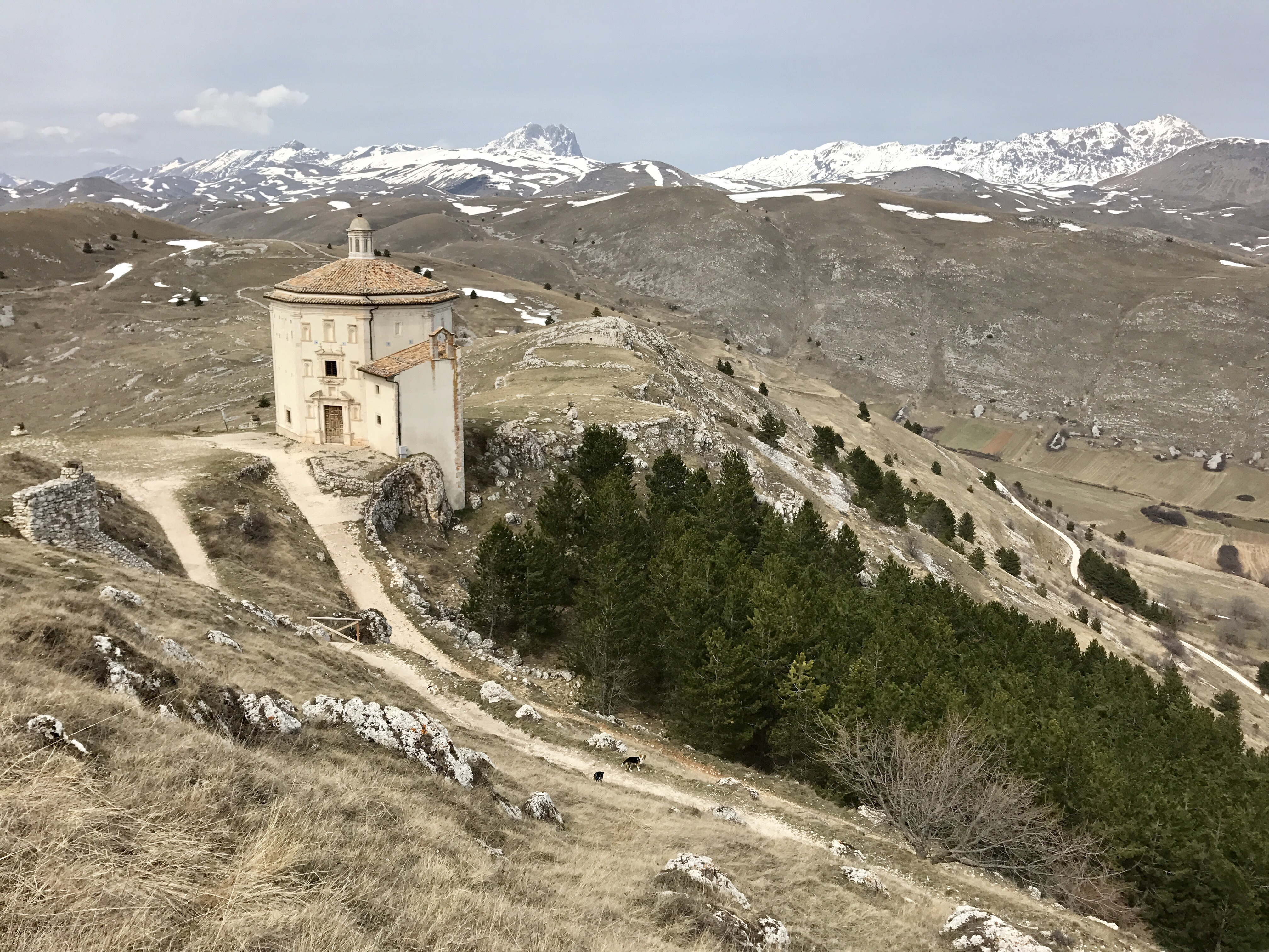 Chiesa di Santa Maria Della pietà